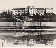 御城の外濠に映る旧第一校舎